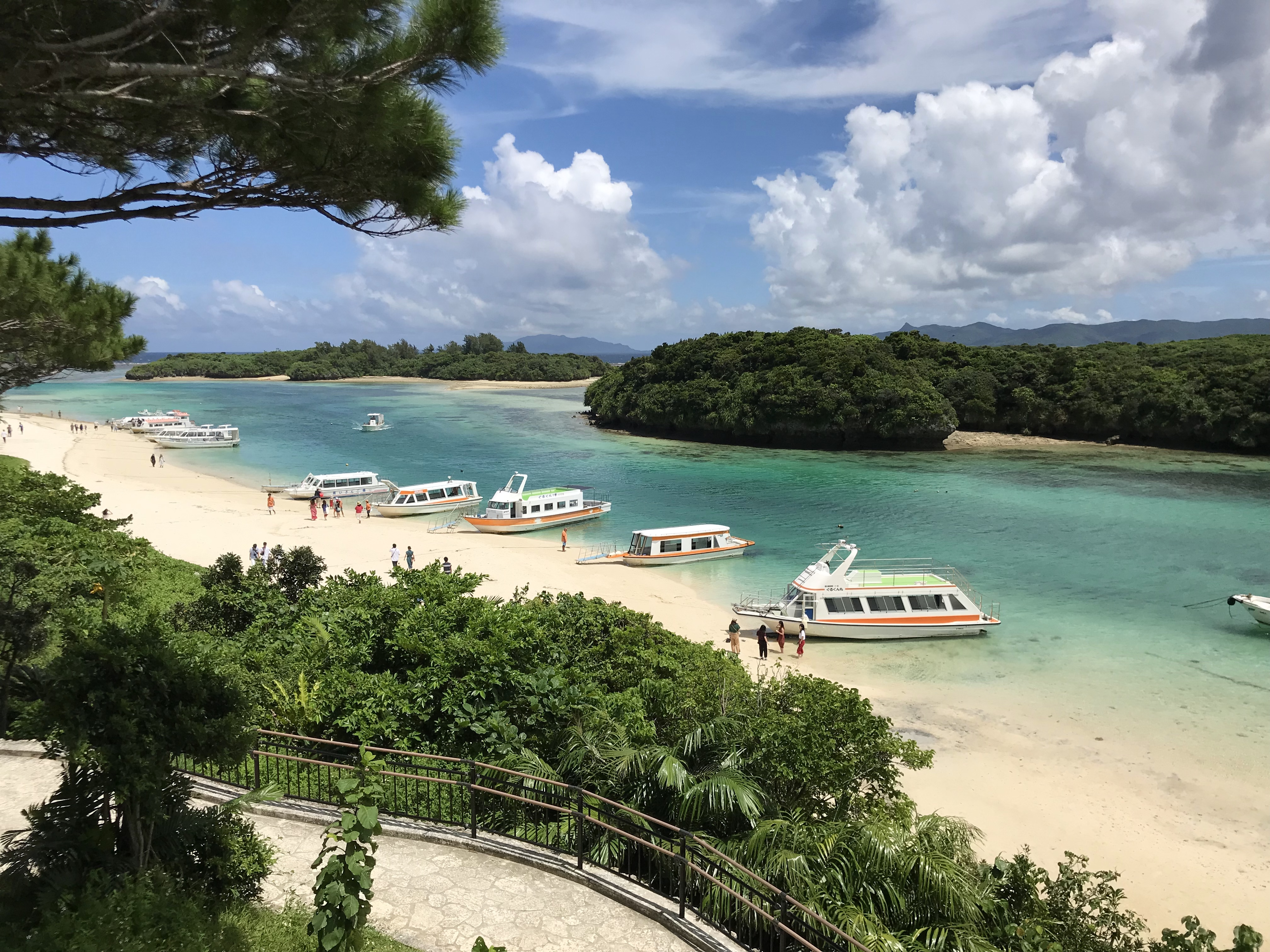 石垣市川平公園から見た川平湾